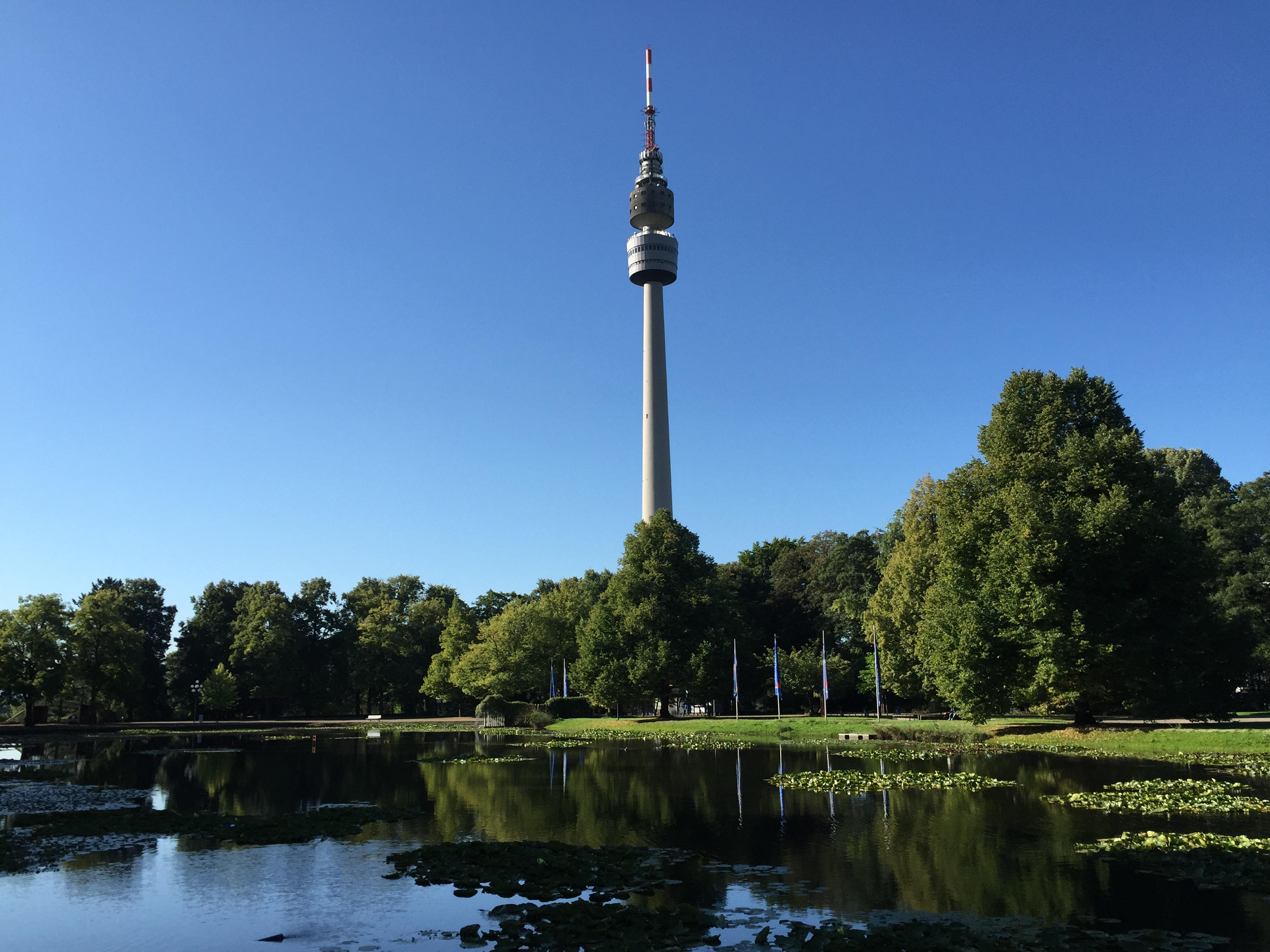 Fernsehturm DortmundThis is a photograph of an architectural monument., no. A 0864